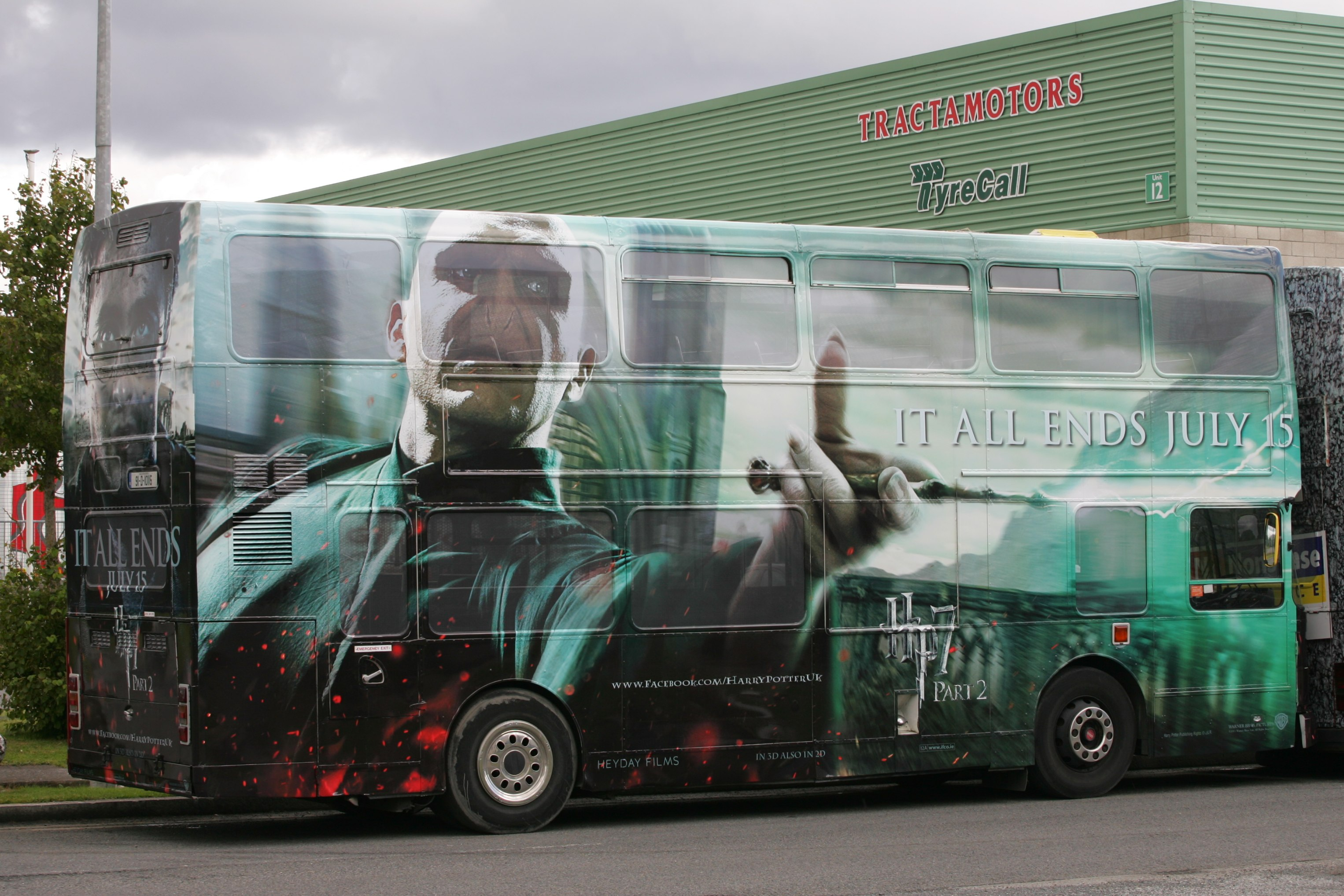 RH116 "Harry Potter Film 2011"